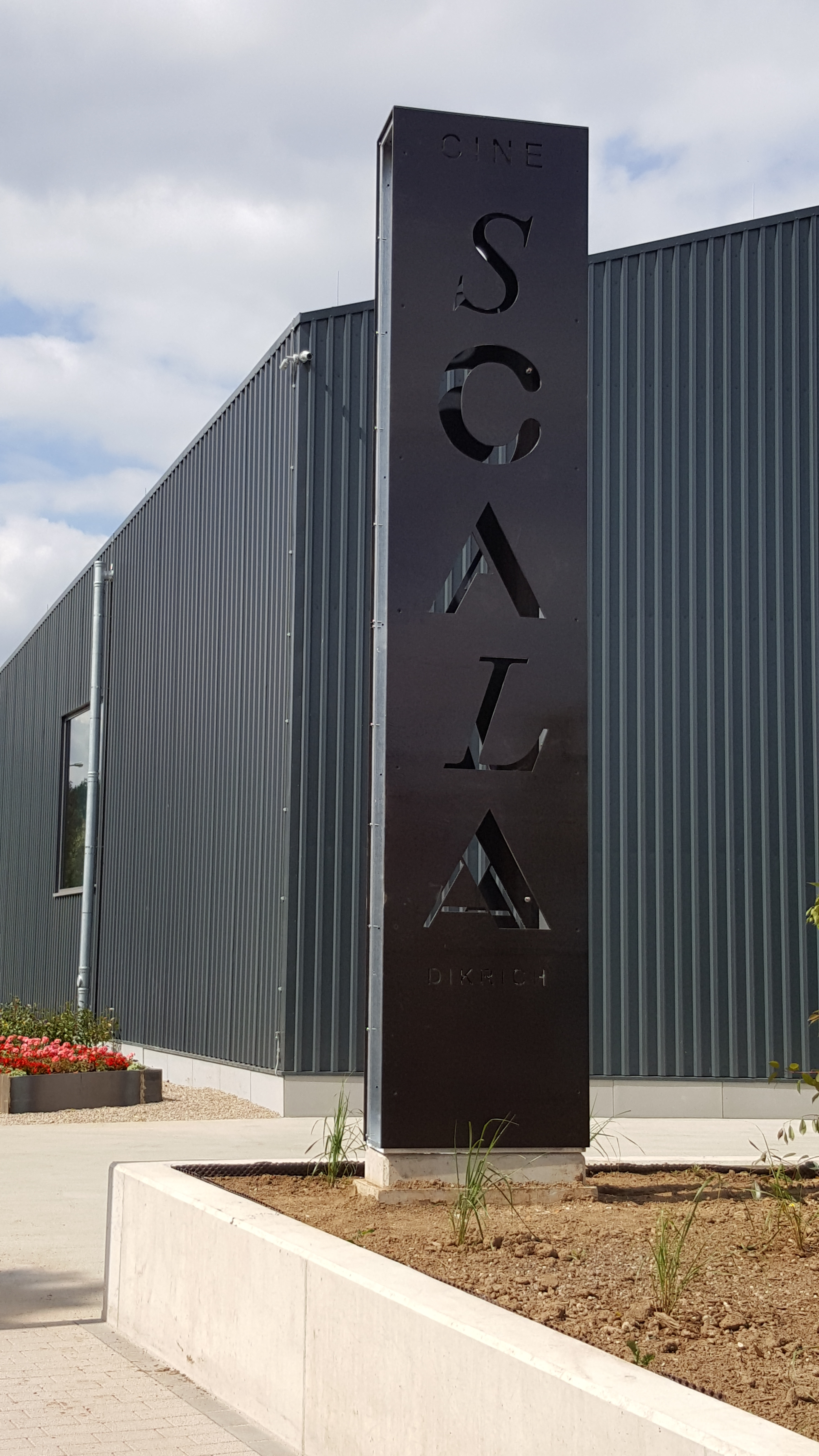 Den nei Kino Scala zu Dikrech virun der Ouverture (vu baussen)